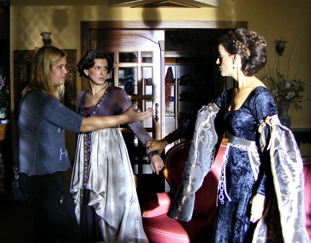 בילי בן משה מביימת את גלית גיאת בסרט "לה סניורה